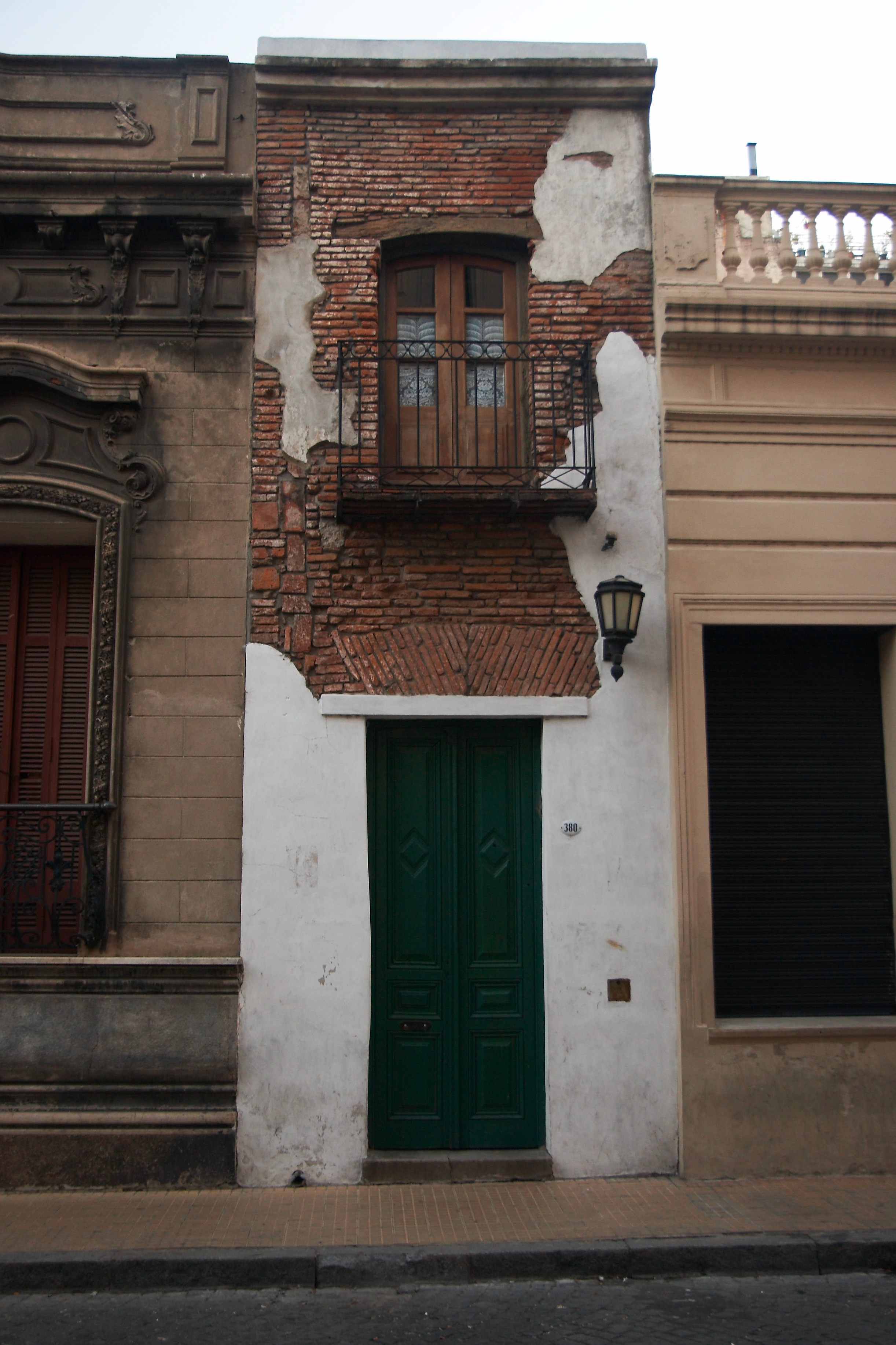 La Casa Mínima, conocida como la casa más angosta de Buenos Aires. Pasaje San Lorenzo 380, barrio de San Telmo, Buenos Aires, Argentina.